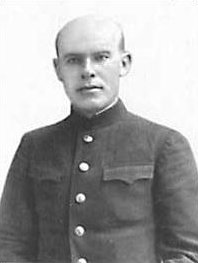 Капитан-лейтенант Александр Данилович Девятко (04.06.1908 - ноябрь 1941). Командир подводной лодки "Щ-211" погибшей в Великой Отечественной войне, в ноябре 1941 г в 9 миль к востоку от Варны, на боевой позиции №21.